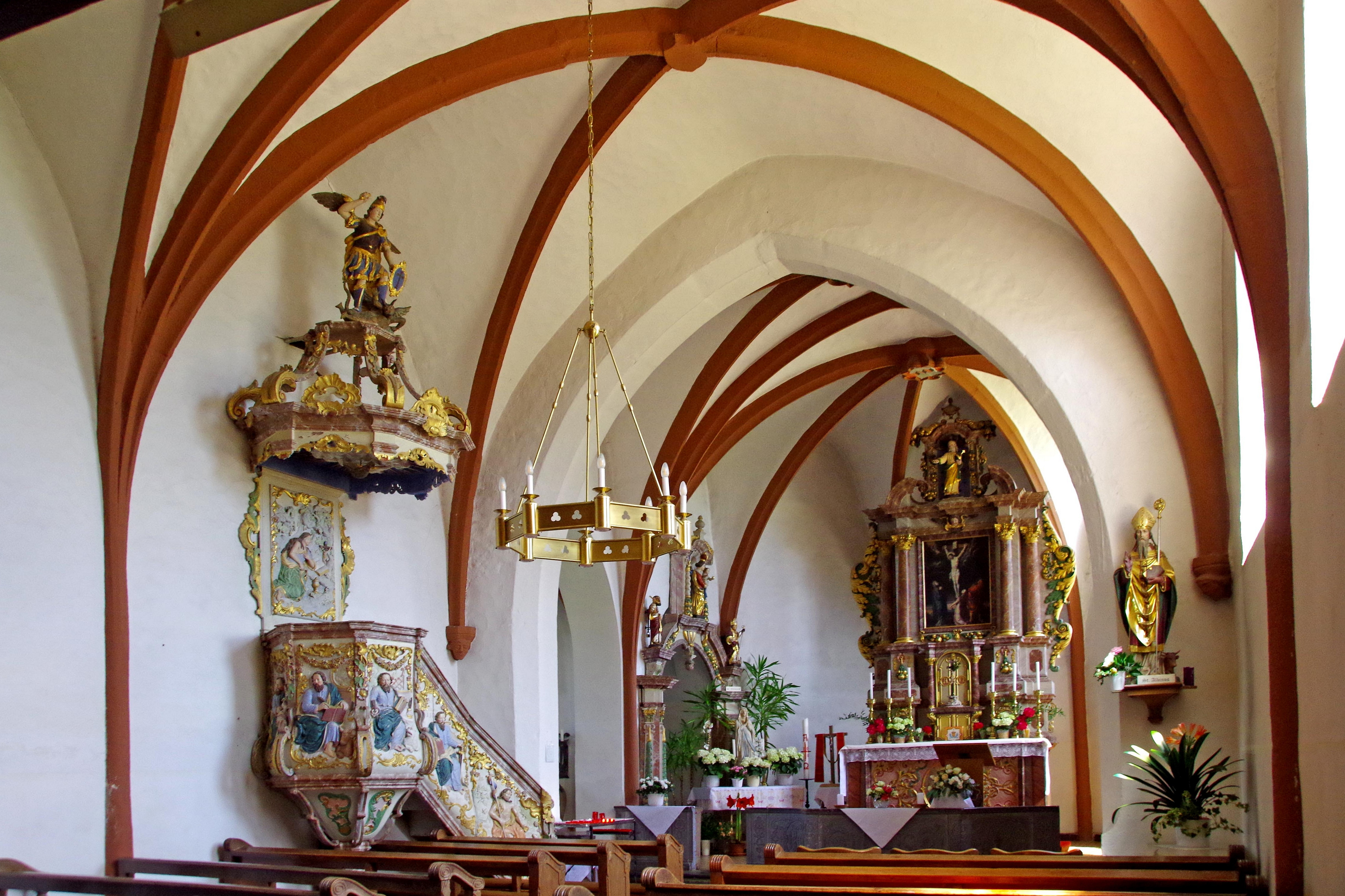 St. Willibrord (Elcherath), Innenraum mit barocker Kanzel